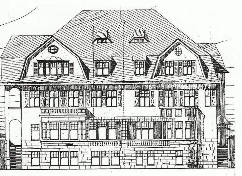 Doppelvilla Rolffs/Banze (heute Kurt-Schumacher-Straße 12/14), Bonn: Entwurf, Aufriss der Straßenfront (Rheinfront) nach Julius Rolffs